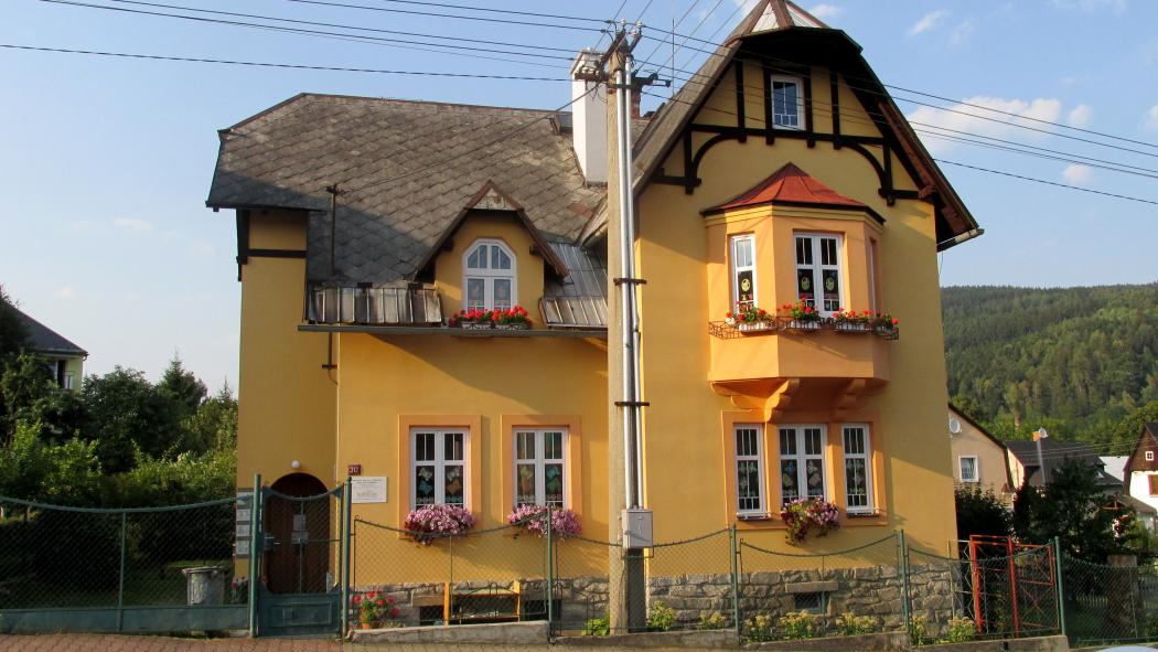 Budova městské knihovny ve Vrbně pod Pradědem